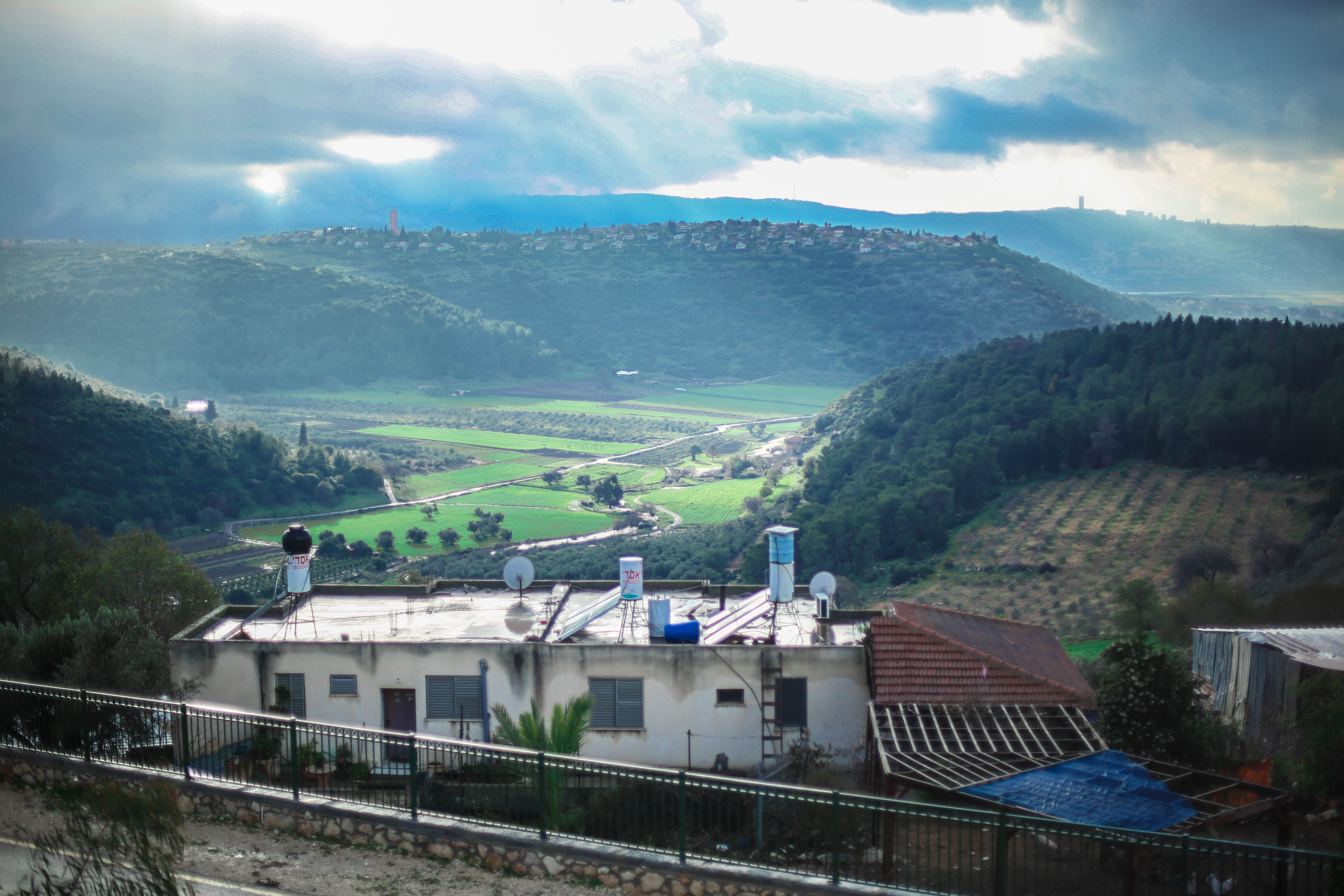 תמונה של הכפר בימי החורף